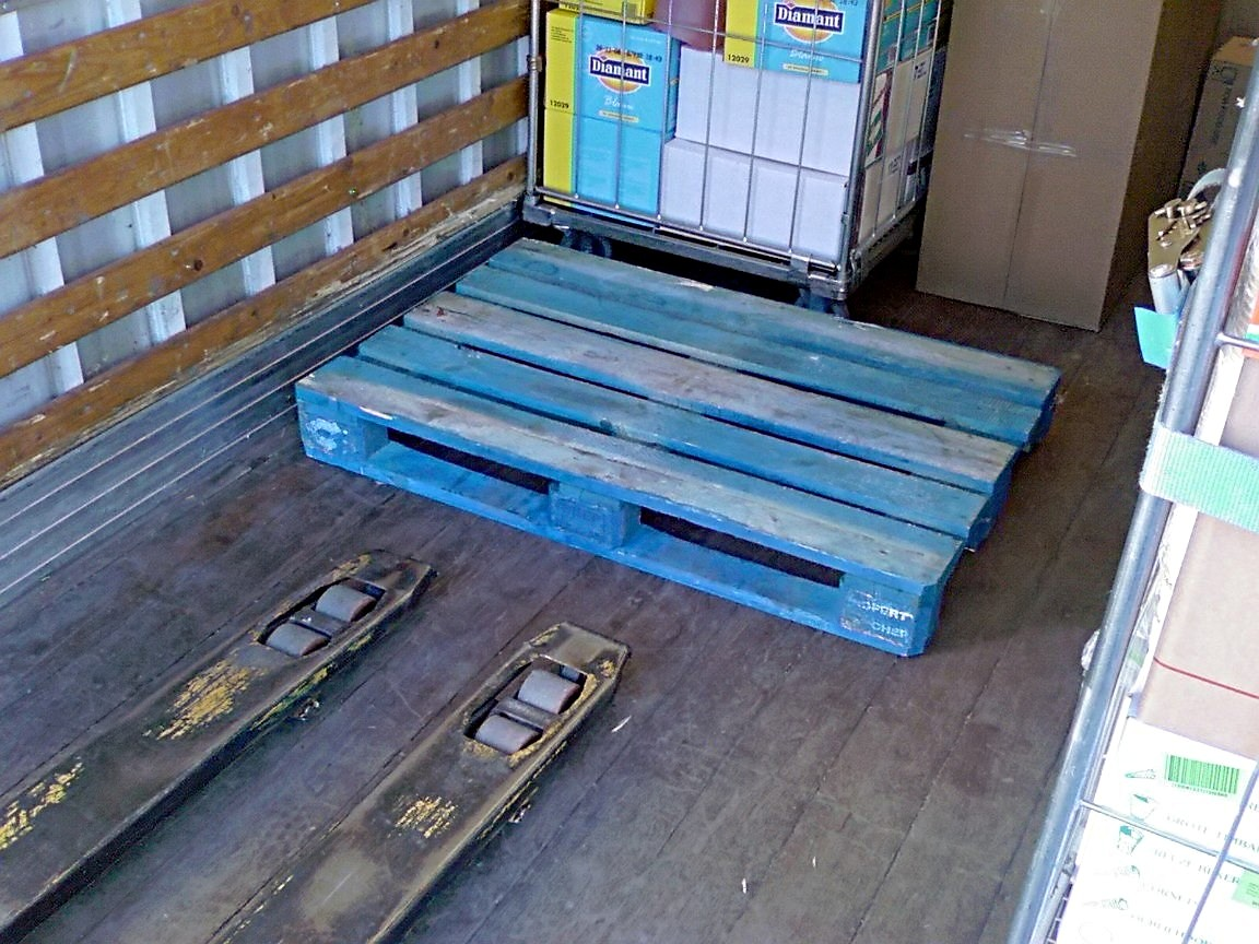 Chep pallet